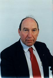 נח הלפרין